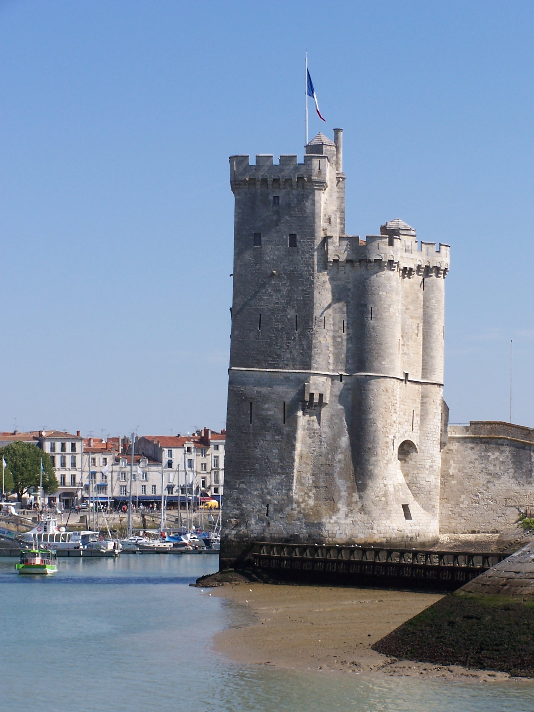 Photographie de la tour Saint-Nicolas (XIVe - XVe siècle), qui est, avec la tour de la Chaîne et la tour de la Lanterne, l'une des trois tours du front de mer de La Rochelle, et l'une des deux tours emblématiques du Vieux-Port. Elle a été classée monument historique en 1879. L'inclinaison de la tour est due à un affaissement du terrain, lors de la construction. La construction de la tour débute vers 1345, alors que la ville de La Rochelle est sous occupation anglaise. De longs pieux de chêne ferrés sont d'abord enfoncés dans la vase et calés à l'aide de pierres, puis l'ensemble est recouvert d'un radier (plancher de poutres), l'ensemble faisant office de fondations. Cependant, le poids de la tour et la nature instable du terrain provoquent tout de même son enfoncement et son basculement. Les constructeurs, qui ne parviennent pas à la redresser, décident de la stabiliser et interrompent le chantier. Ce n'est qu'en 1372, date à laquelle La Rochelle redevient française, que le chantier reprend, symbolisant l'alliance entre Charles V, roi de France, et la ville. Il sera achevé en 1376. La tour est aujourd'hui encore inclinée de 2%, signe de l'enfoncement constaté pendant sa construction. La rampe d'accès, qui permet aujourd'hui d'accéder au premier étage, n'existait pas à l'origine, et n'a été construite qu'en 1569.